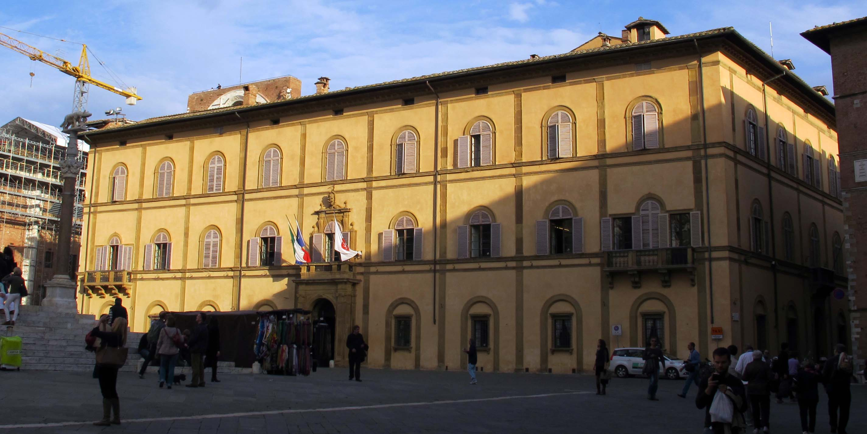 Siena, piazza del Duomo e dintorni